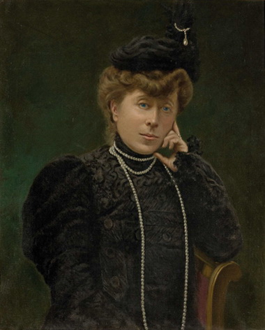 Duquesa de Villahermosa. Número de inventario: 2007-72-13.